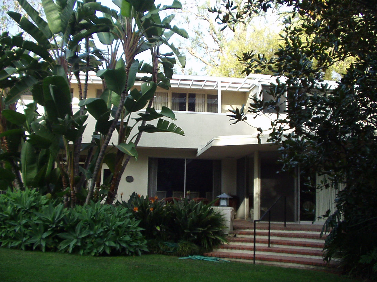 Thomas Mann-Haus, Brentwood, Los Angeles